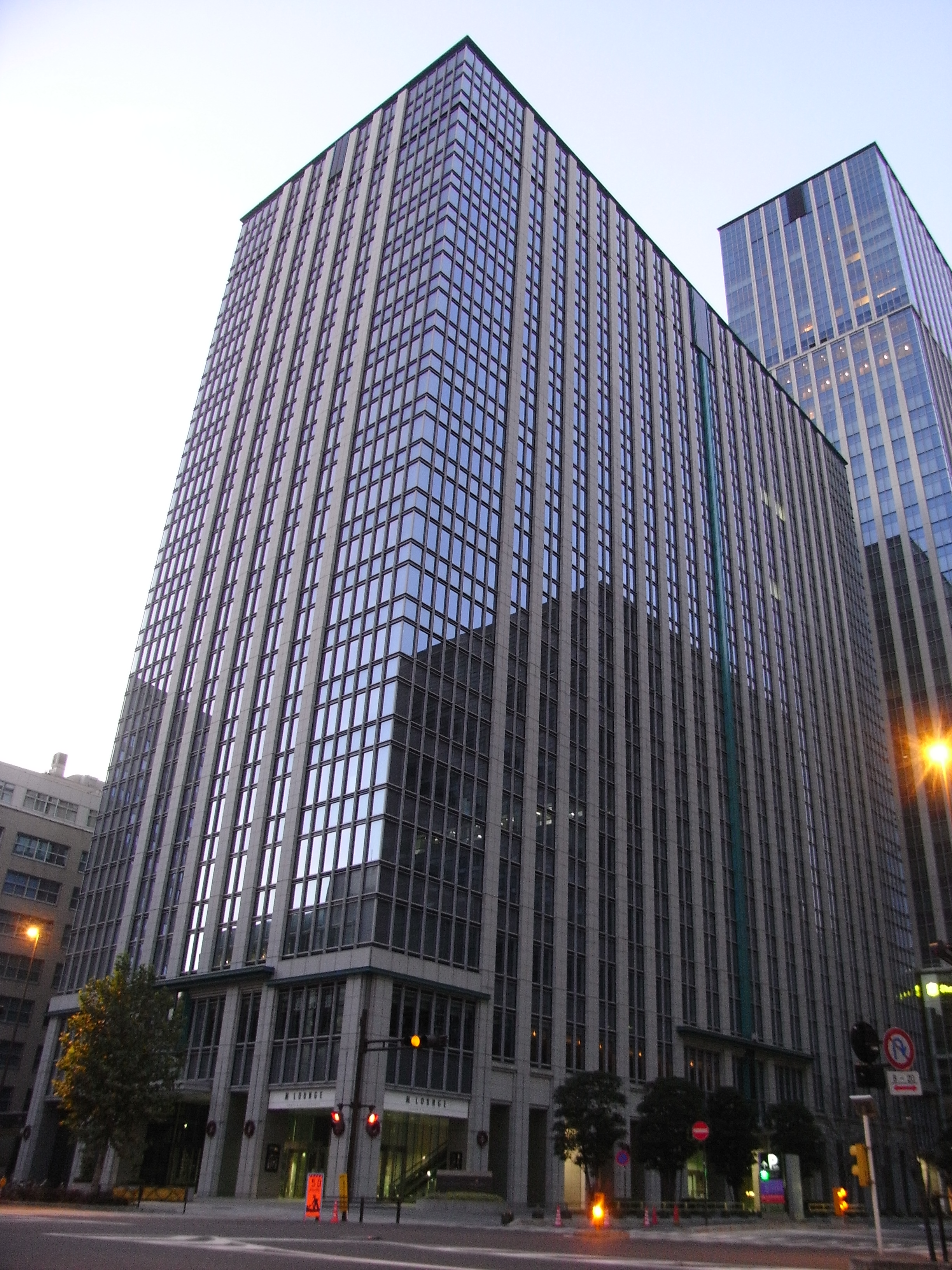 丸の内トラストタワーN館 (東京都千代田区丸の内1-8-1)